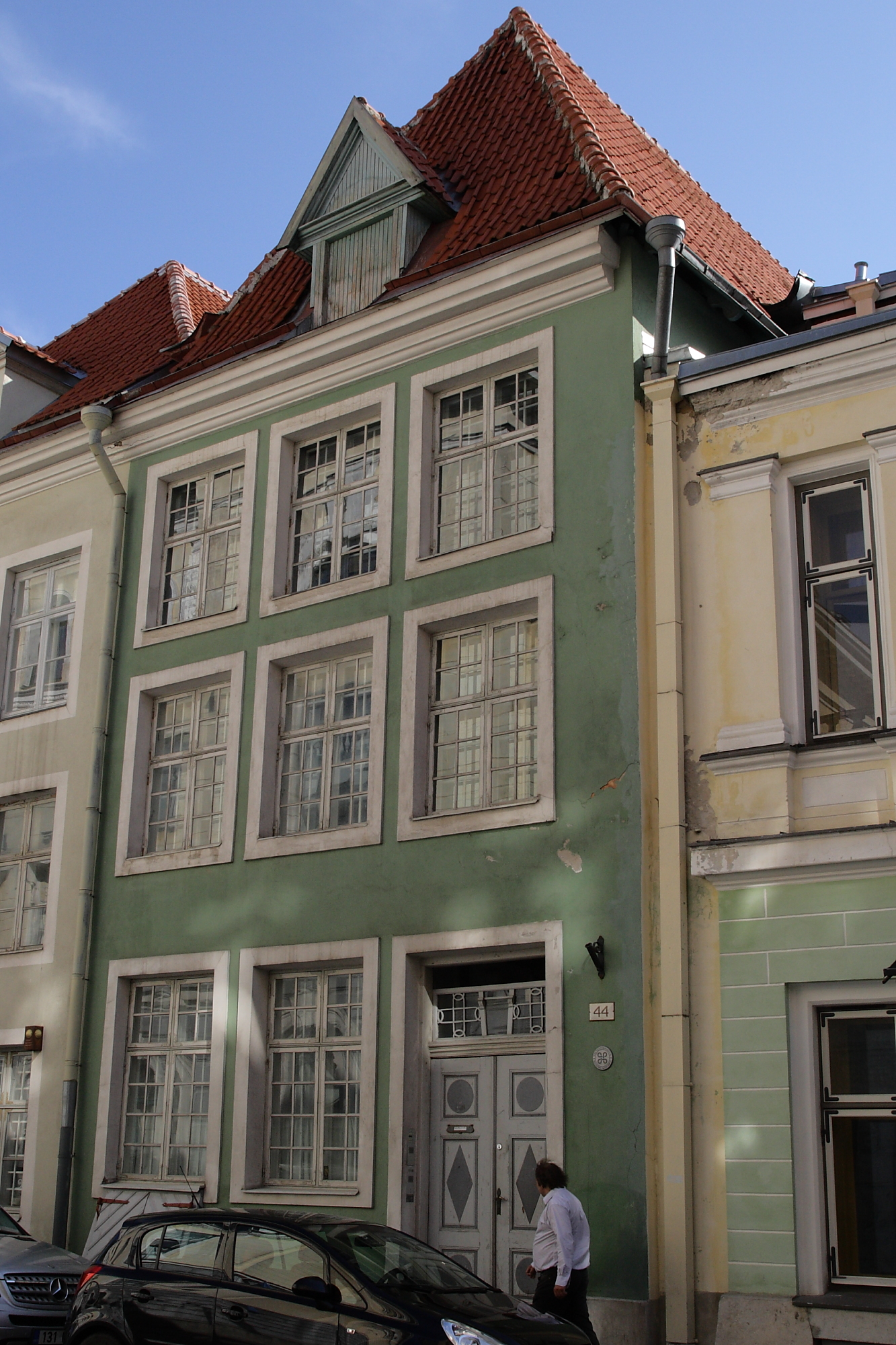 Tallinn, elamu Pikk 44, 15.-19.saj